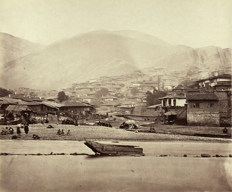 Велес, 1863, на левия бряг на Вардар